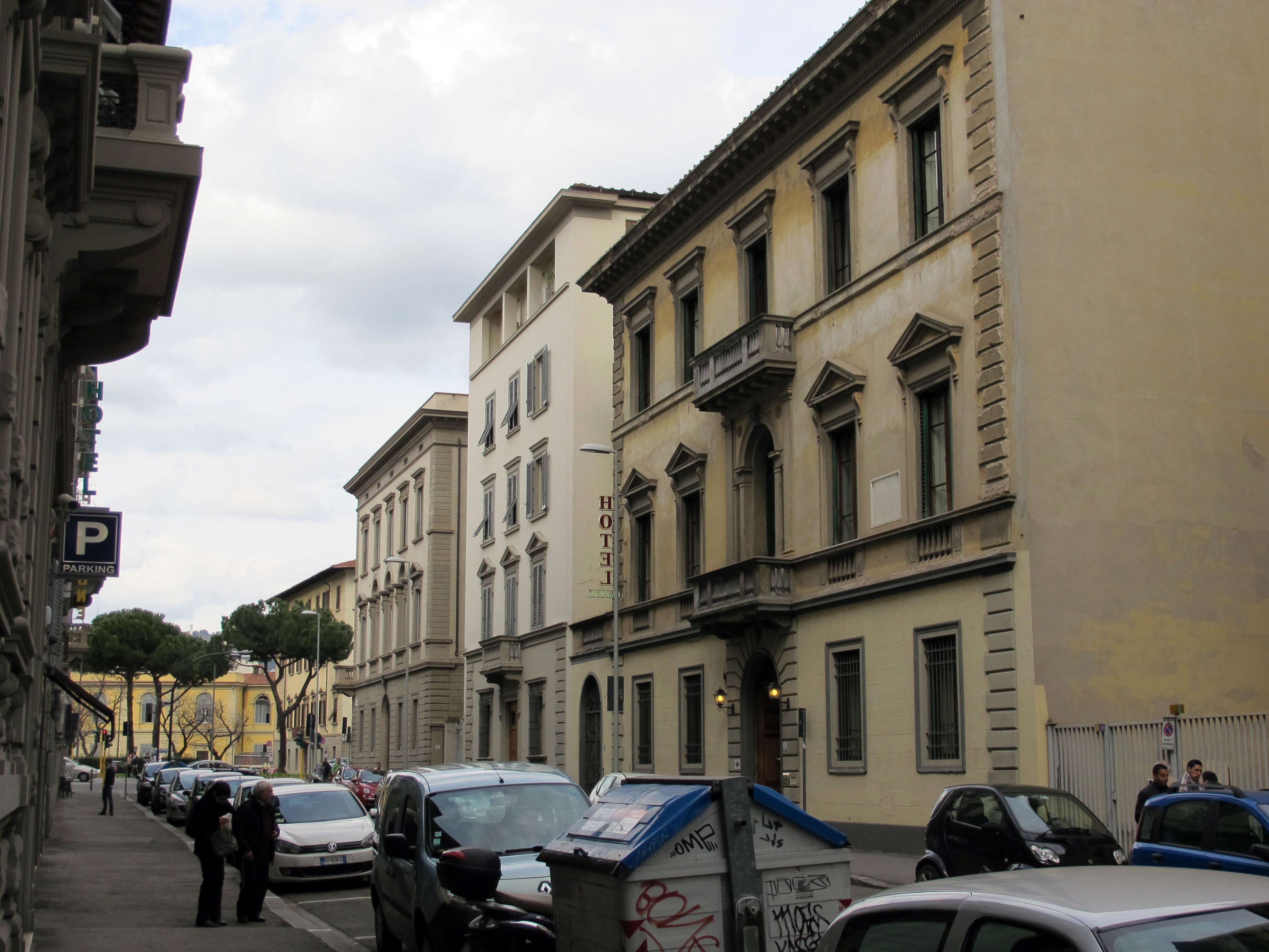 Via alfieri, veduta